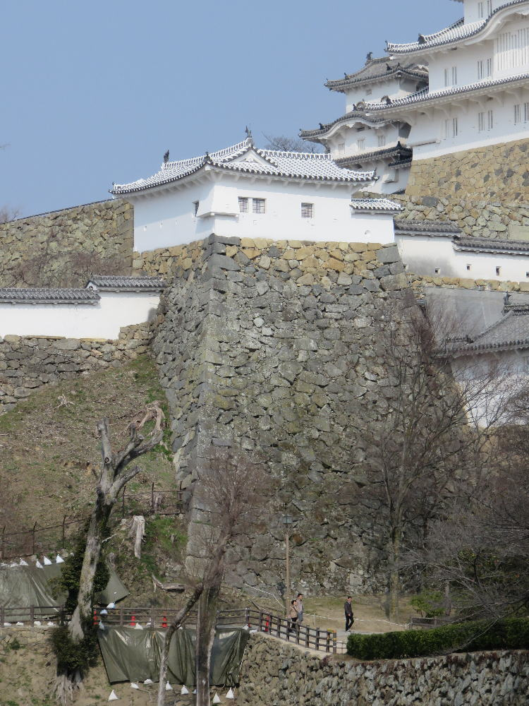 姫路城の太鼓櫓と石垣。